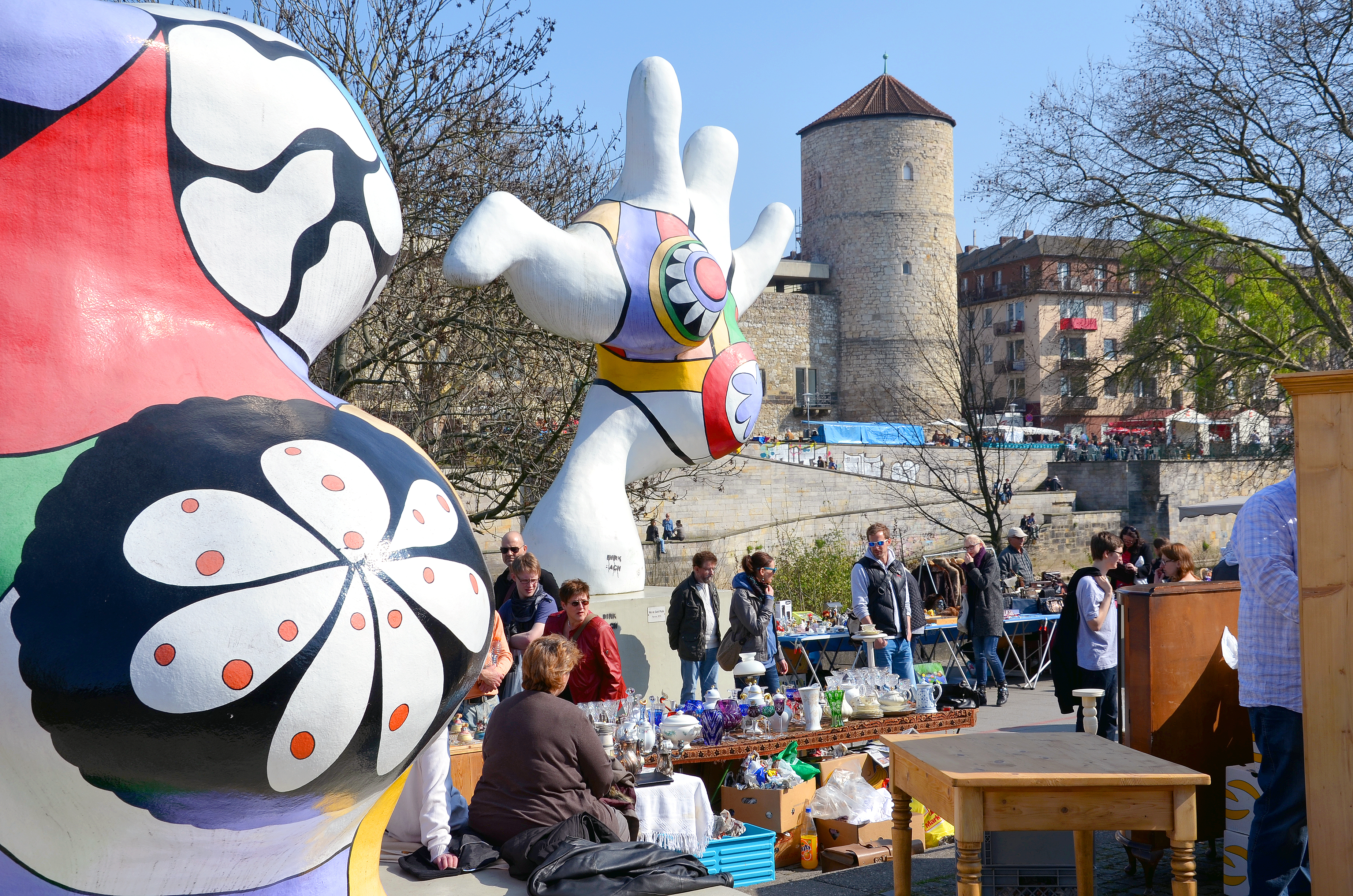 Parallel zum Leibnizufer in Hannover verläuft die Mike-Gehrke-Promenade, wo sich jeden Sonnabend Bewohner und Besucher der niedersächsischen Landeshauptstadt auf dem Altstadt-Flohmarkt begegnen. Auf dieser Aufnahme sind Händler und Passanten zwischen den Figuren der Nanas von Hannovers Ehrenbürgerin Niki de Saint Phalle zu sehen, im Hintergrund der Beginenturm über der ehemaligen Pferdeschwemme an der Leine...